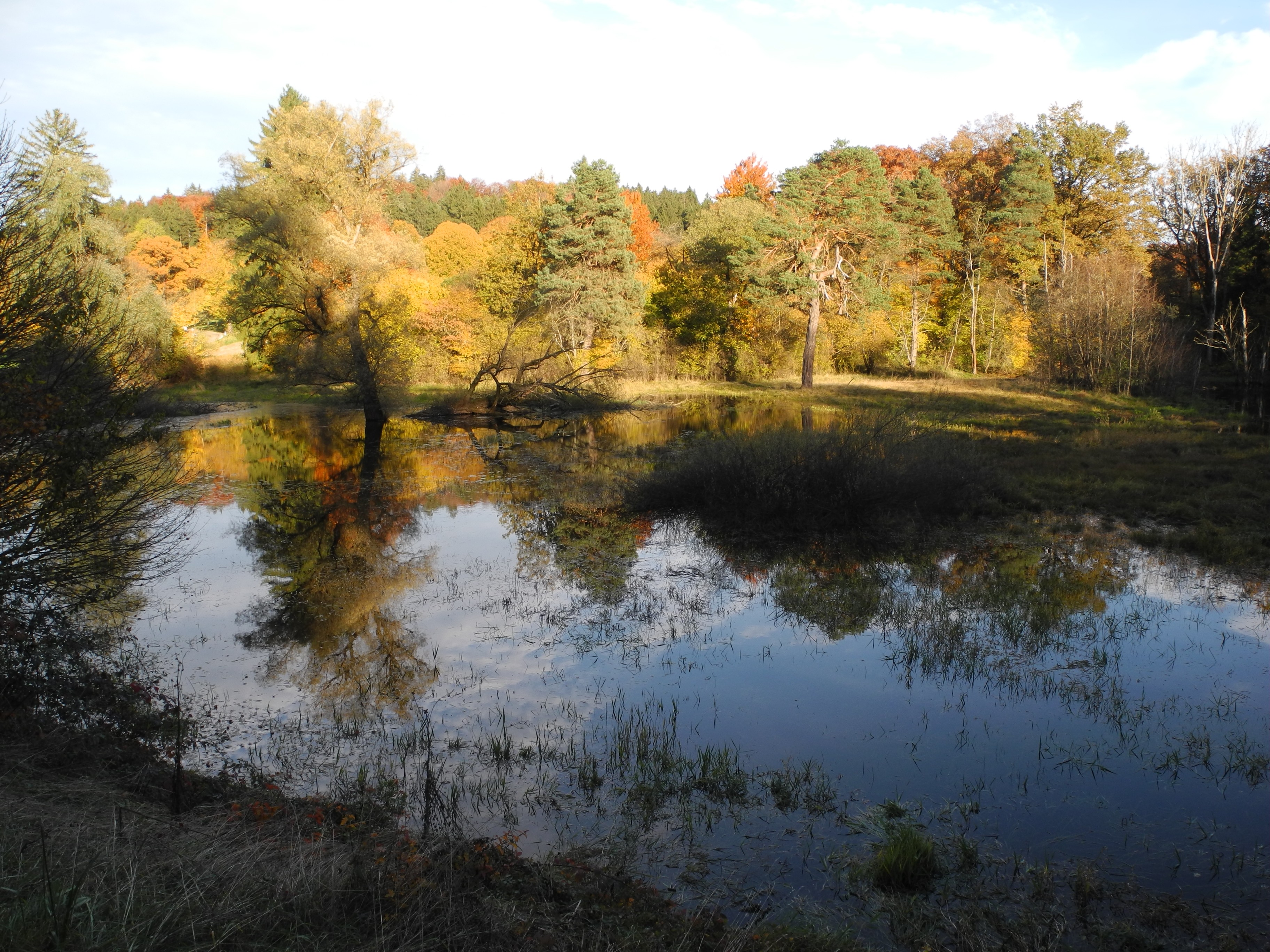 Eberfing -Gewässer im Herbst